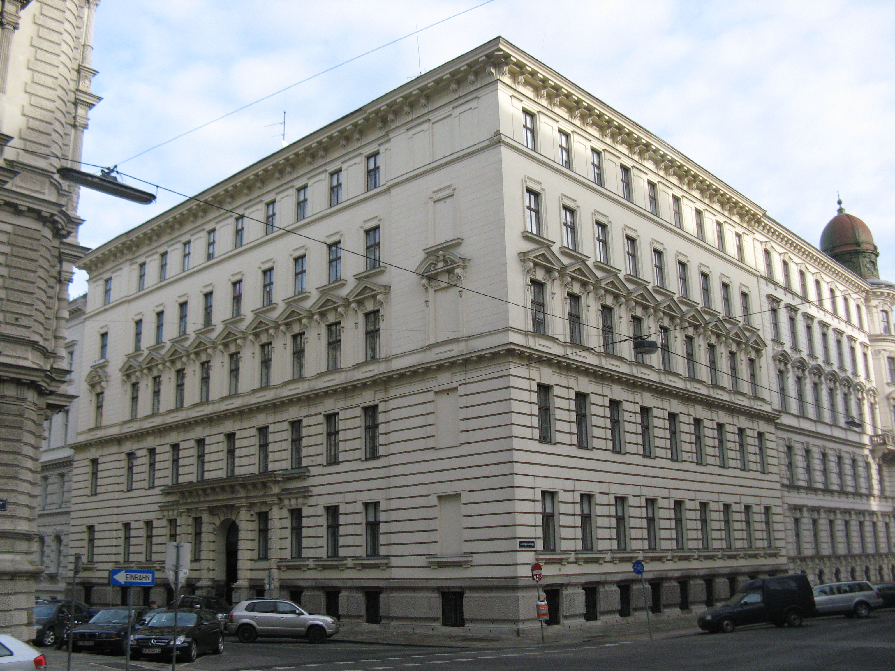 Haus Rathausstraße 20 (1885-86) von Ladislaus Boguslawski, Wien-Innere Stadt